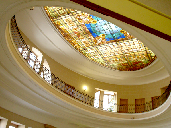 Teto da Thermas Antonio Carlos em Poços de Caldas - Minas Gerais - Brasil